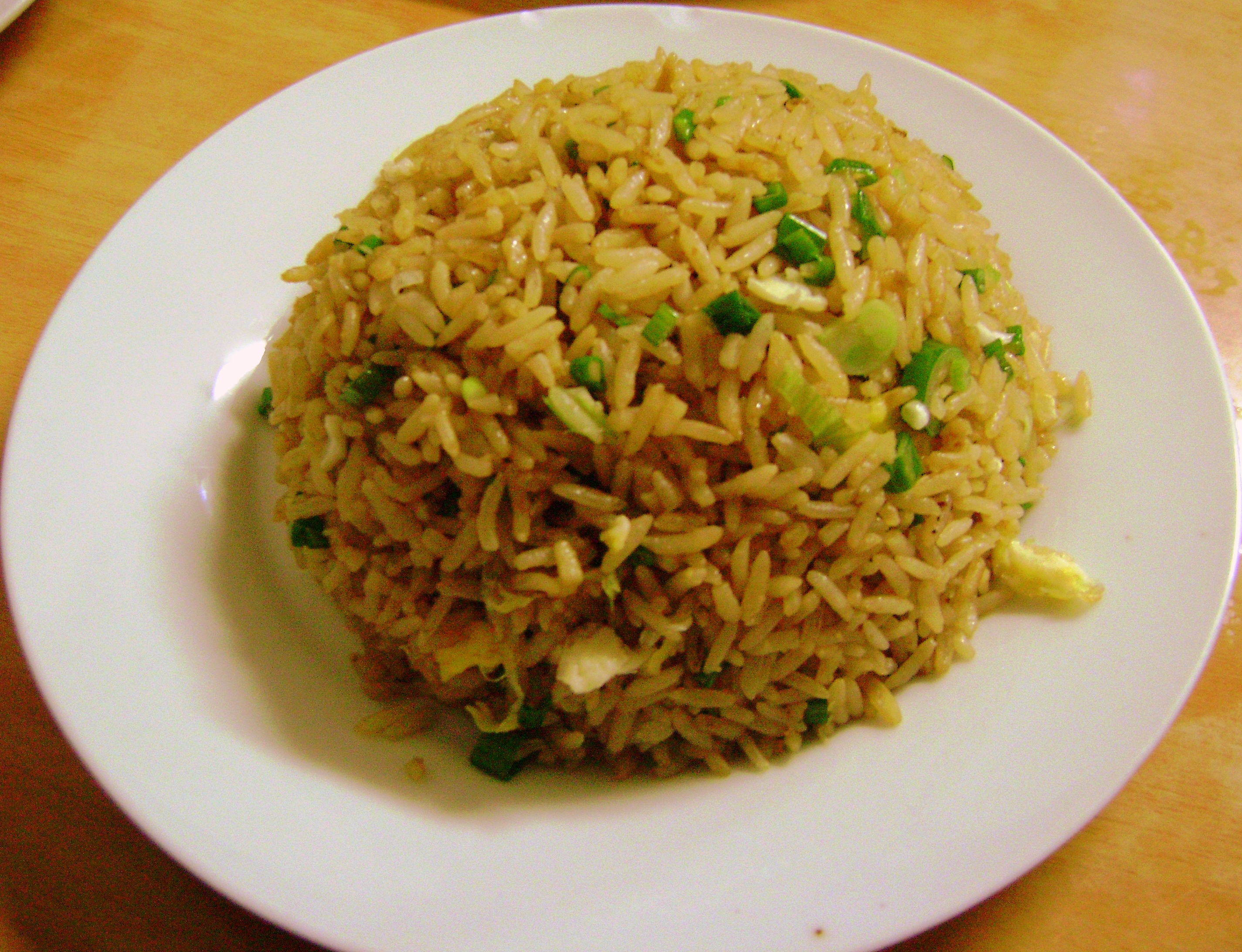 Arroz chaufa simple. Lima, Perú.